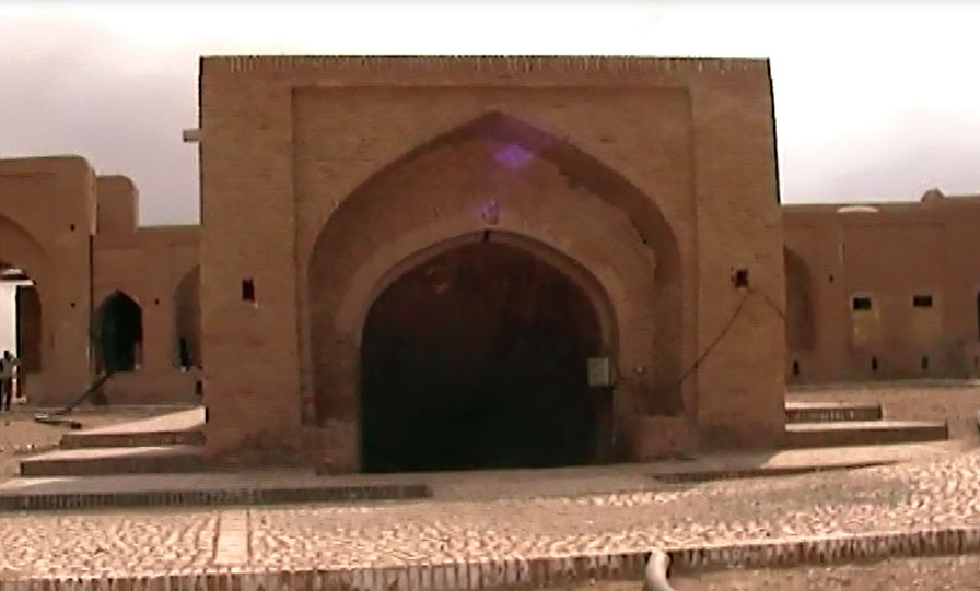 سردر آب انبار